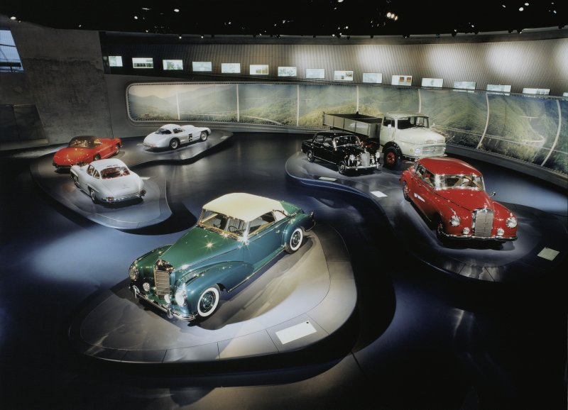 Mercedes-Benz Welt